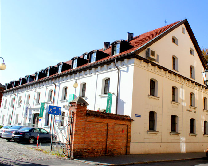 Toruń, ul. Dominikańska 7/9 - dawny magazyn prowiantowy "Nowy Arsensł" w zespole Twierdzy Toruń, 1820-25 (zabytek nr A/342)